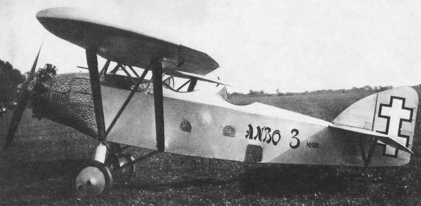 Litewski samolot szkolny ANBO-III.